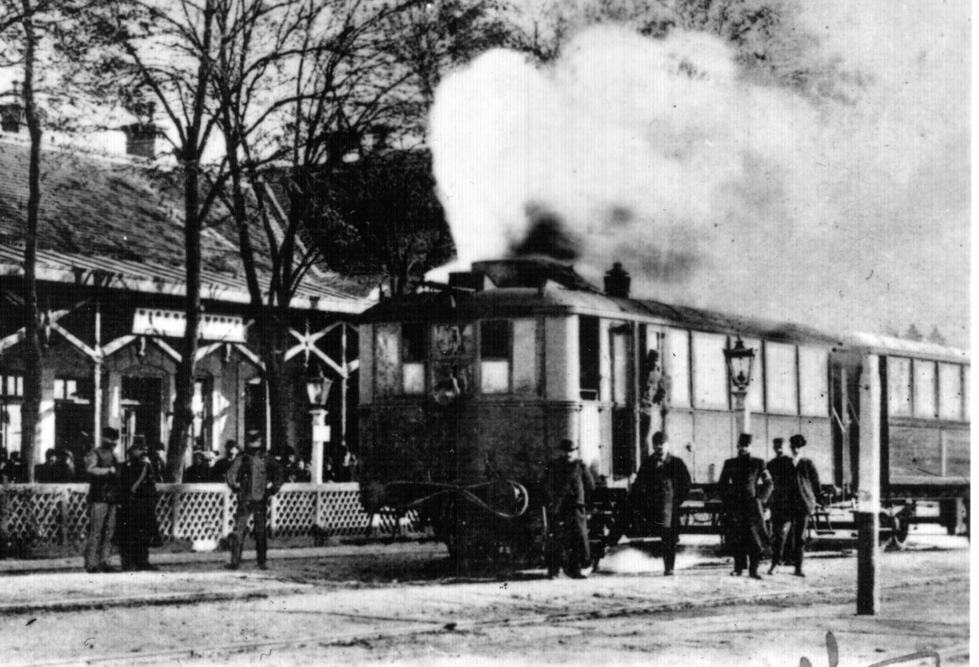 A MÁV VIIIb jellegű gőzmotorkocsija Nagybecskerek vasútállomáson